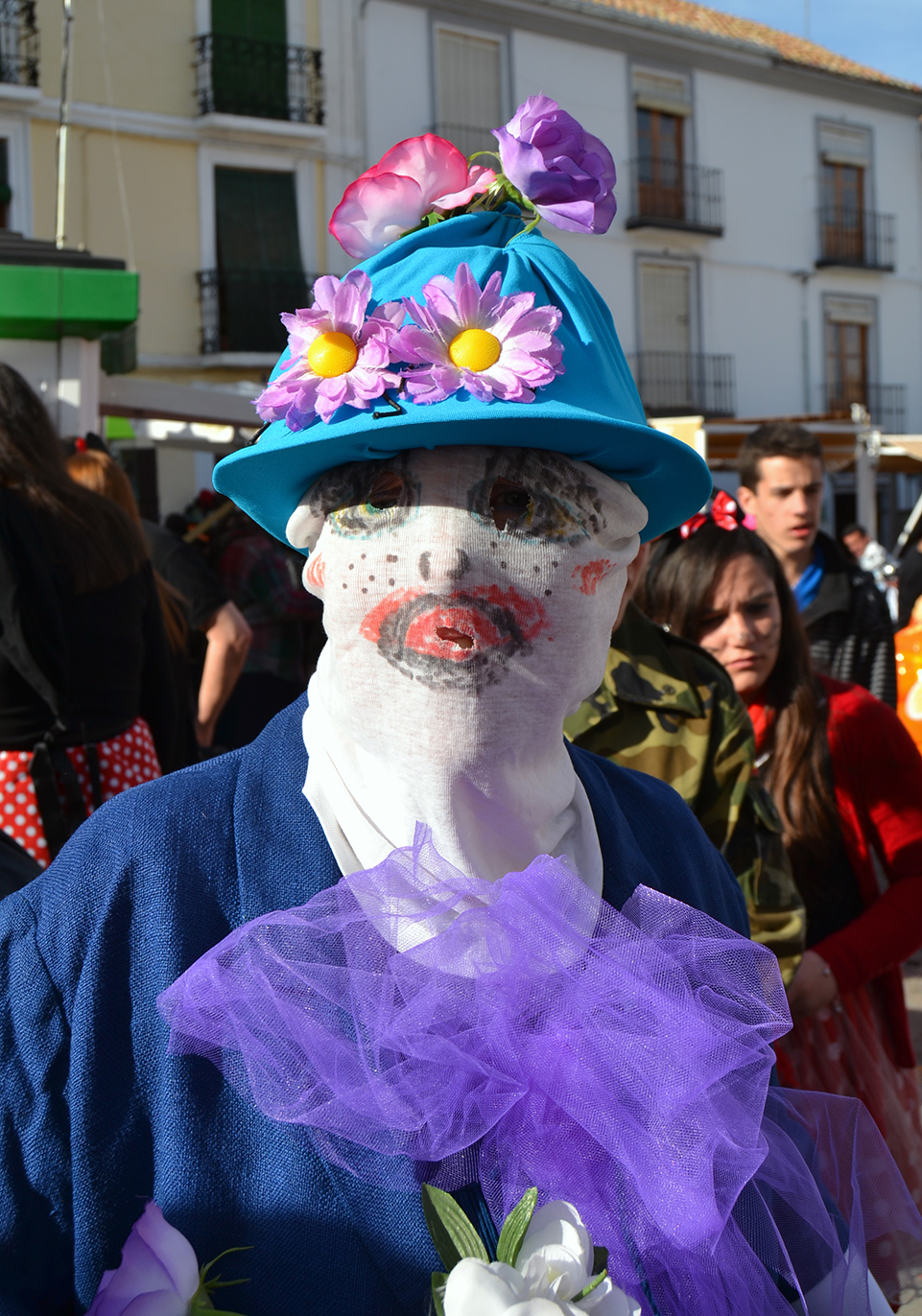 Carnaval de Alhama de Granada This is a photography of a Folklore festival in Spain (Wikidata id Q23459821).